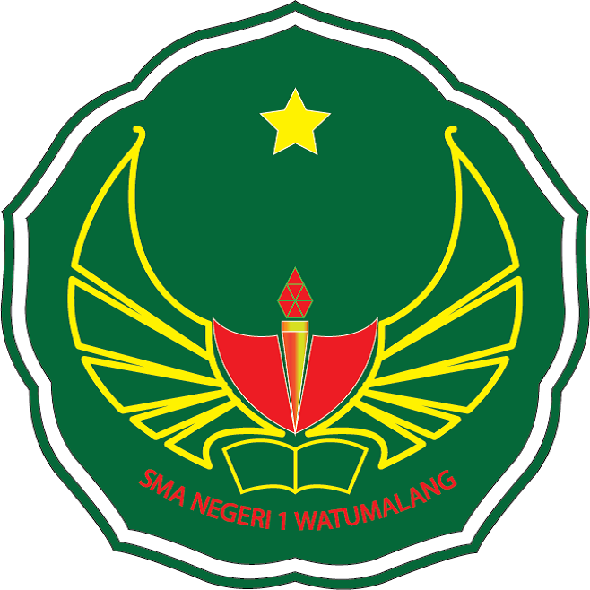 logo sma negeri 1 watumalang dibuat tahun pertama (2014).